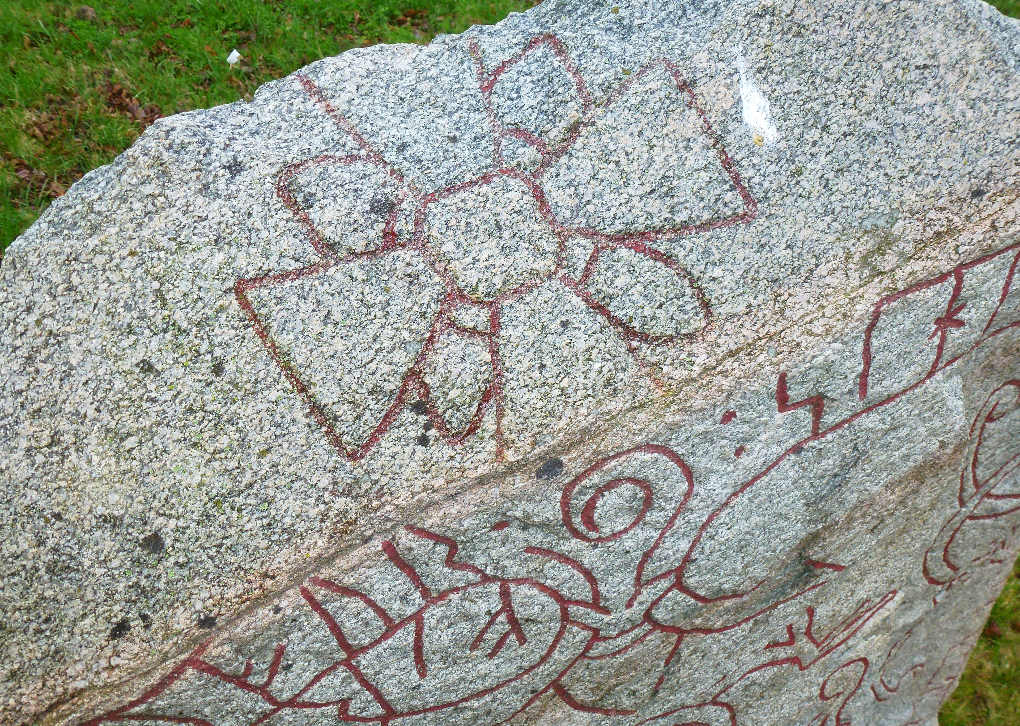 Kistastenen U75 vid Kista gård